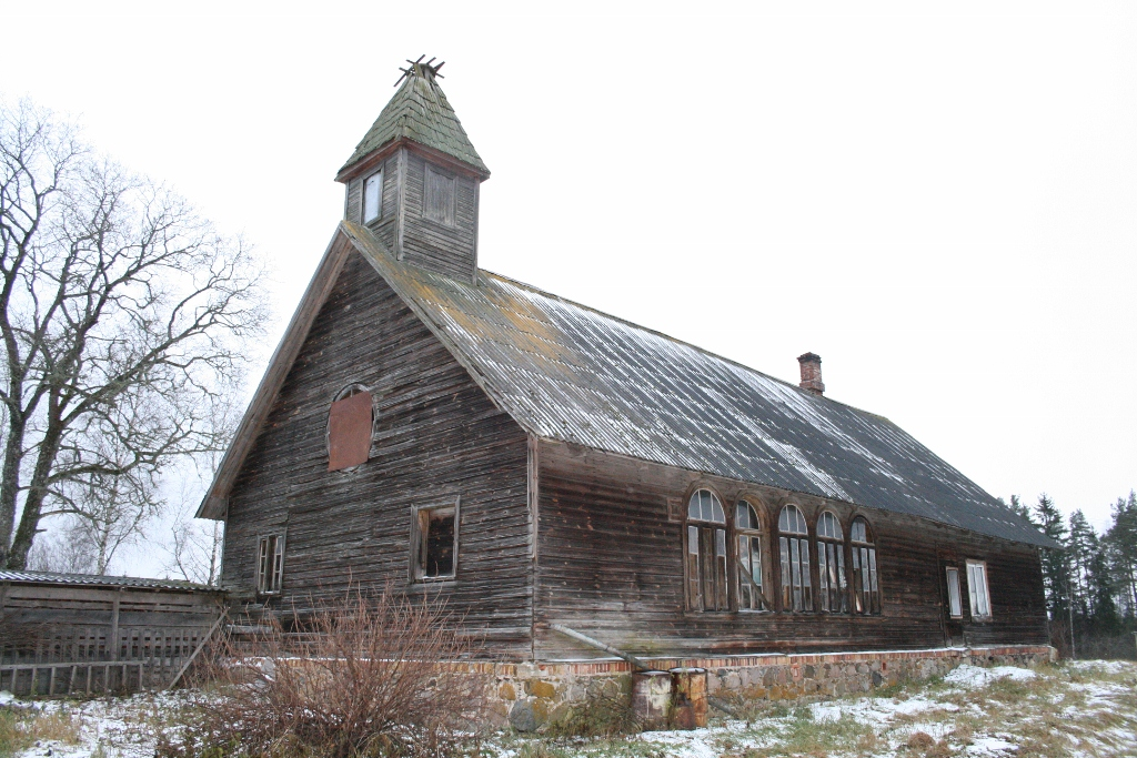 Krüüdneri abikirik